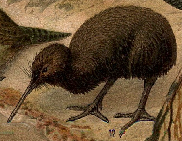 Kivi